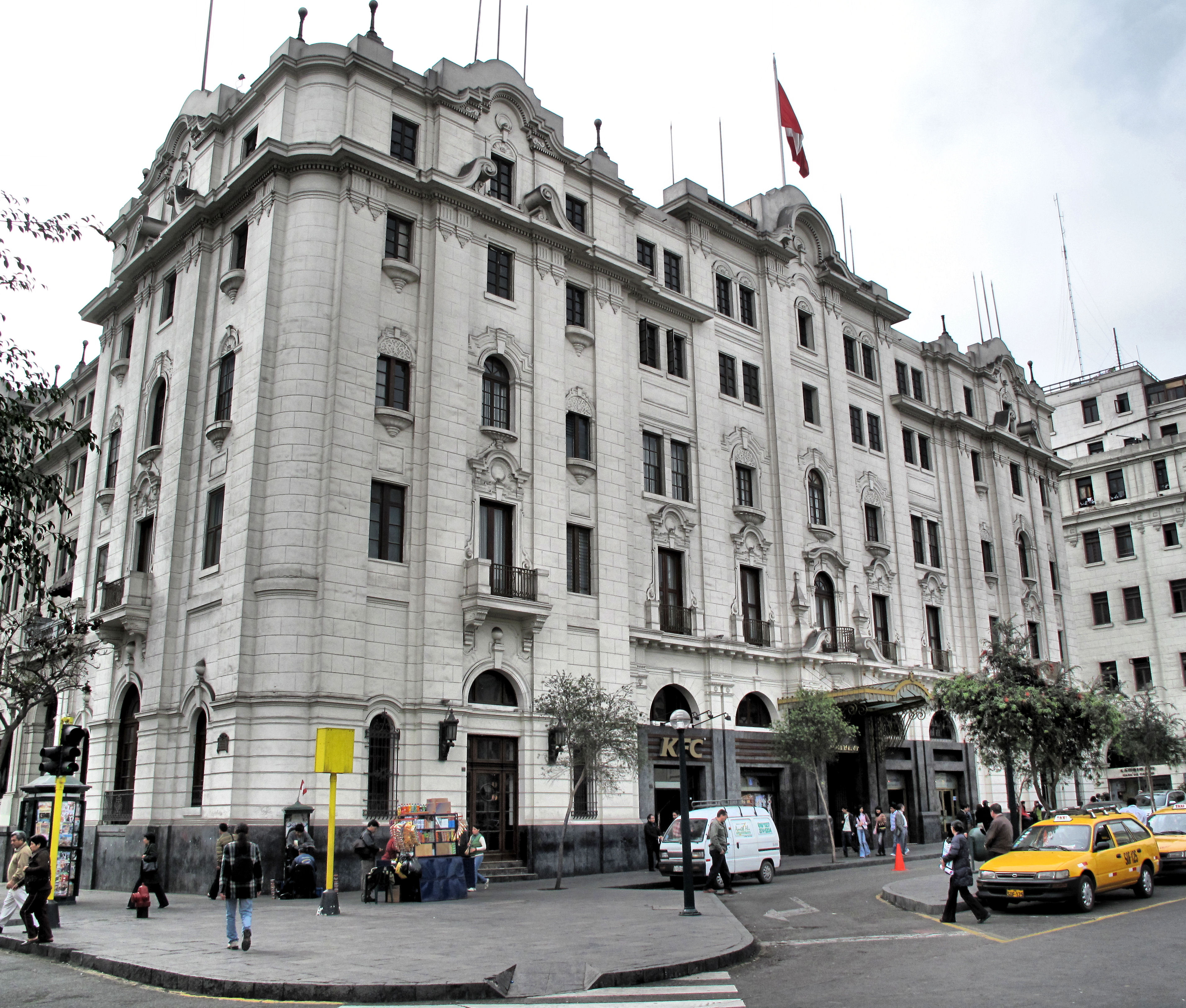 KFC